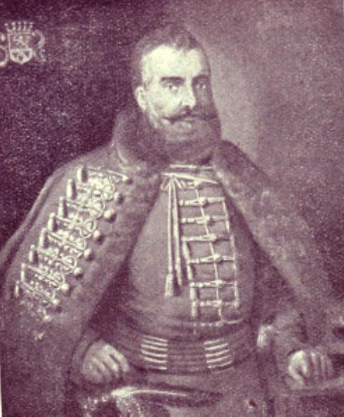 Mikó Ferenc arcképe